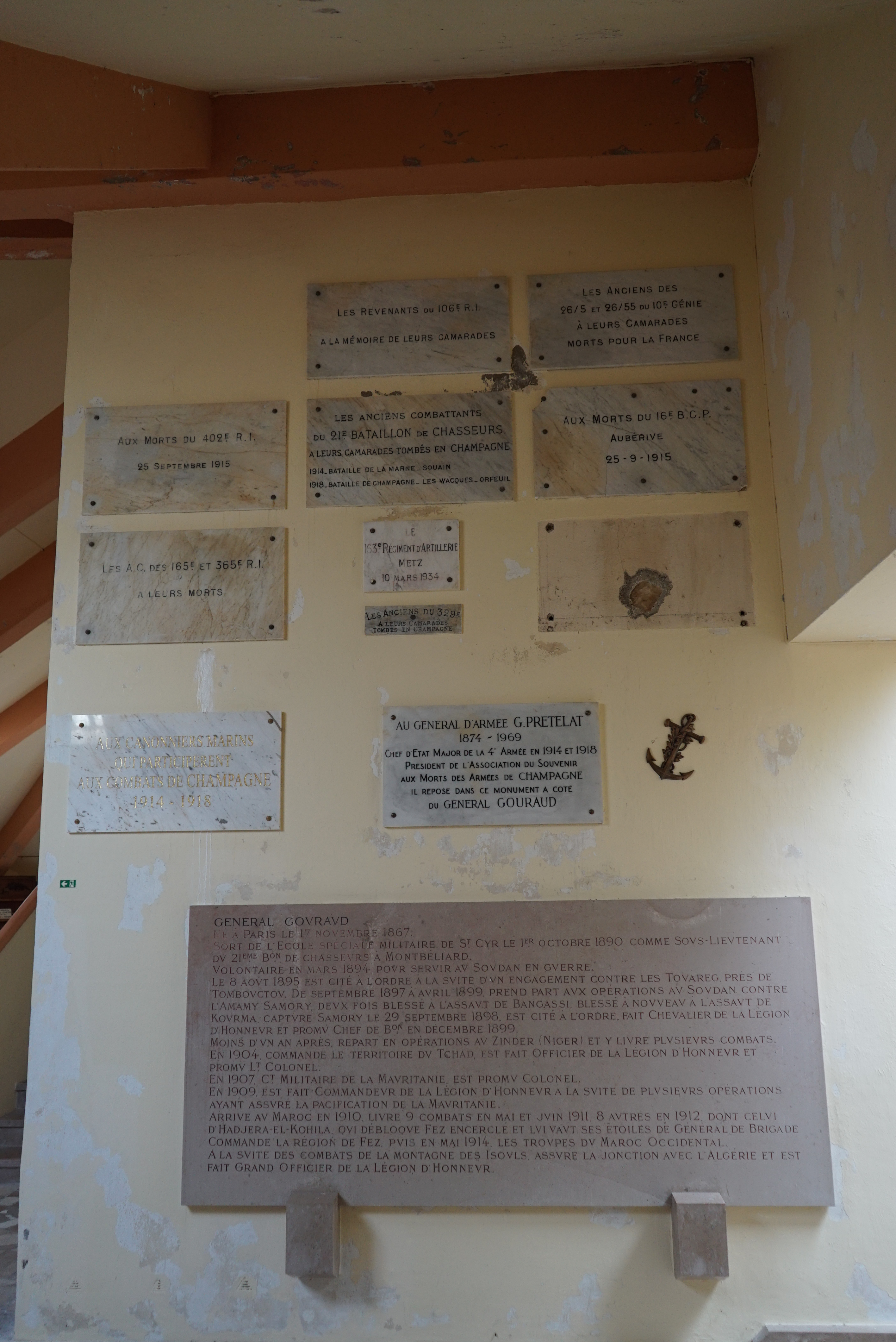 intérieur de l'ossuaire de Navarin.